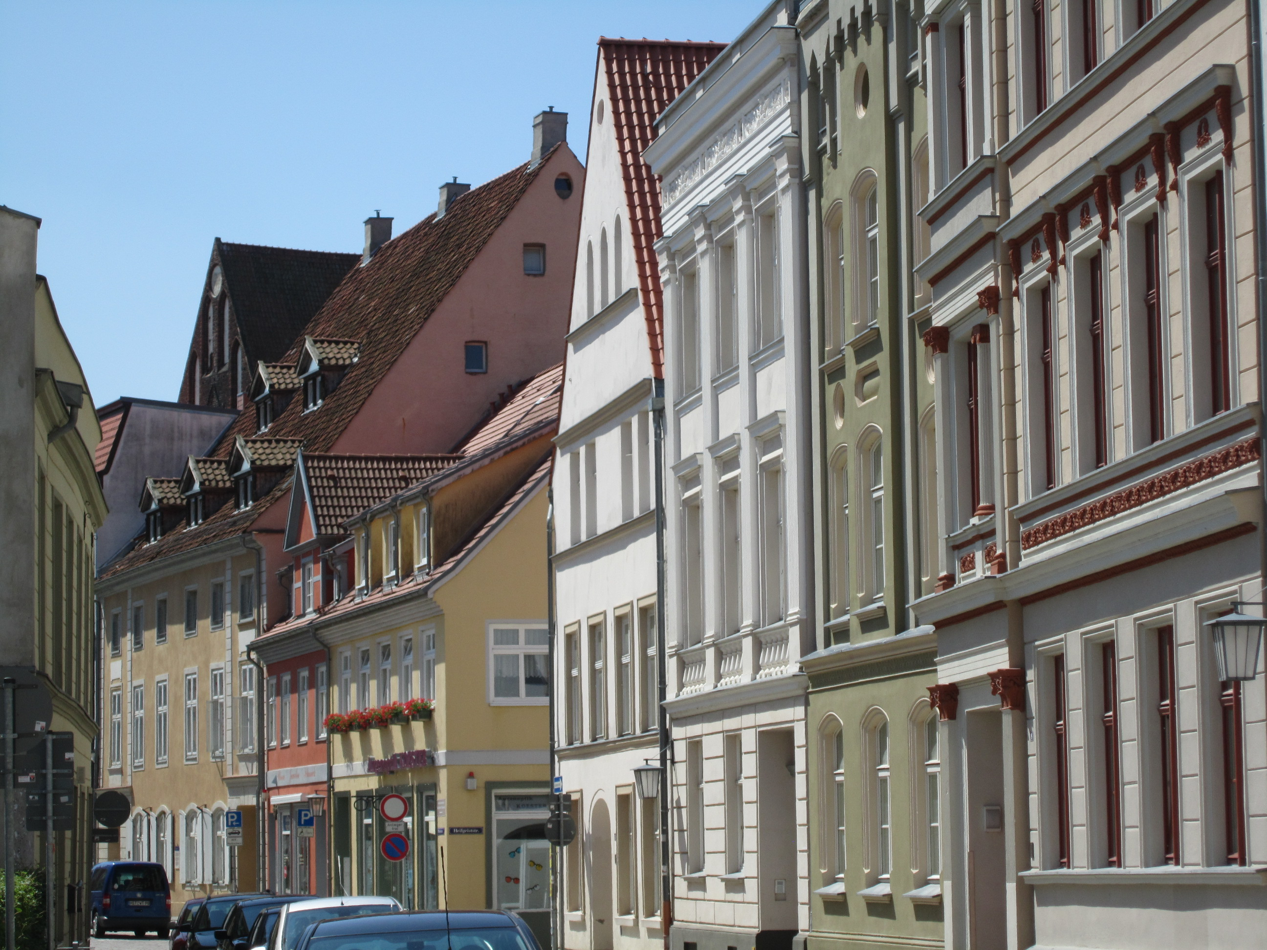 Mönchstraße in Stralsund. Blickrichtung: Süden (Richtung Neuer Markt)